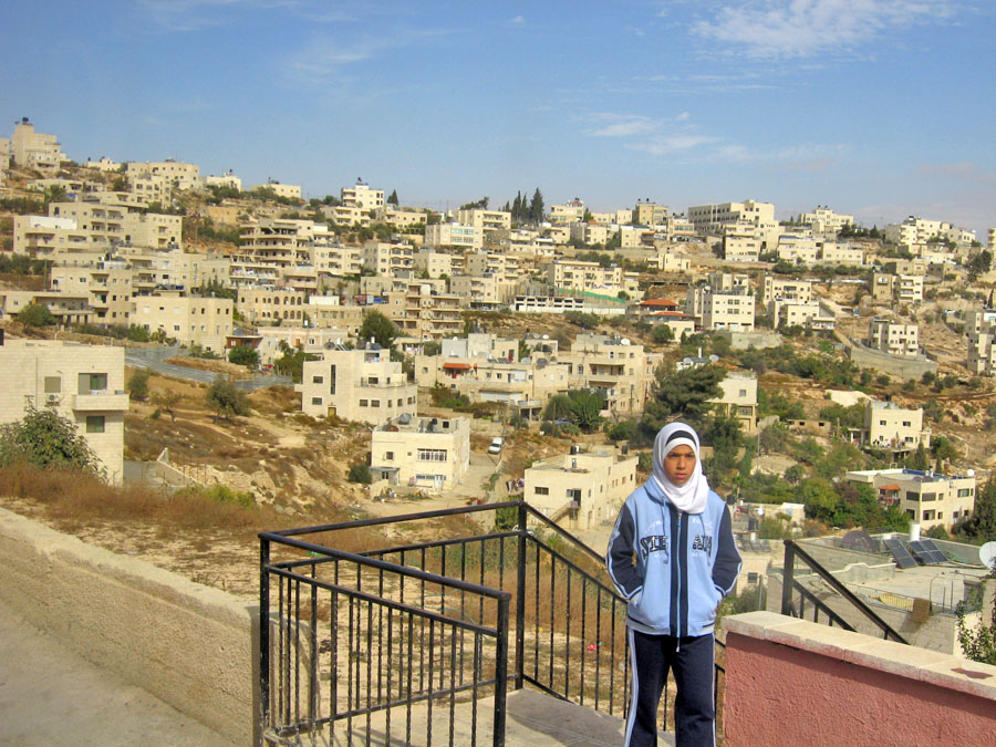 Sur Baher near Jerusalem